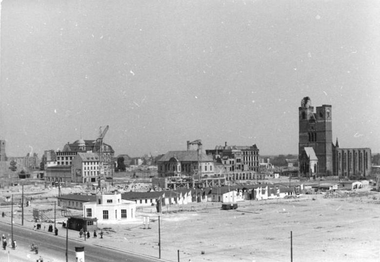 Zentralbild-Biscan 6 Motive 26.4.1954 Ein Jahr Nationales Aufbauprogramm in Magdeburg Vor einem Jahr, am 10. Mai 1953, legte der Stellvertreter des Ministerpräsidenten und 1. Sekretär des Zentralkomitees der Sozialistischen Einheitspartei Deutschlands, Walter Ulbricht, den Grundstein zum Nationalen Aufbauprogramm in Magdeburg. Die Ost-West-Strasse soll gebaut werden. Der Ministerrat bewilligte für dieses große Bauvorhaben 15 Millionen DM. An drei Stellen entlang der zukünftigen Ost-West-Strasse wurde mit dem Bau einer Reihe grosser Wohnhäuser begonnen, von denen die ersten jetzt vor der Fertigstellung stehen. In diesem Jahr hat sich dadurch das Bild des Stadtkerns schon grundlegend geändert. Dort, wo früher Trümmerberge lagen, und sich nach der Enttrümmerung leere, tote Flächen hinzogen, erheben sich jetzt vier-, fünf- und sechsstöckige Neubauten, in die in wenigen Wochen viele glückliche Menschen einziehen werden. UBz: Der zukünftige Zentrale Platz bei Beginn der Bauarbeiten vor einem Jahre (Siehe Bild 2)